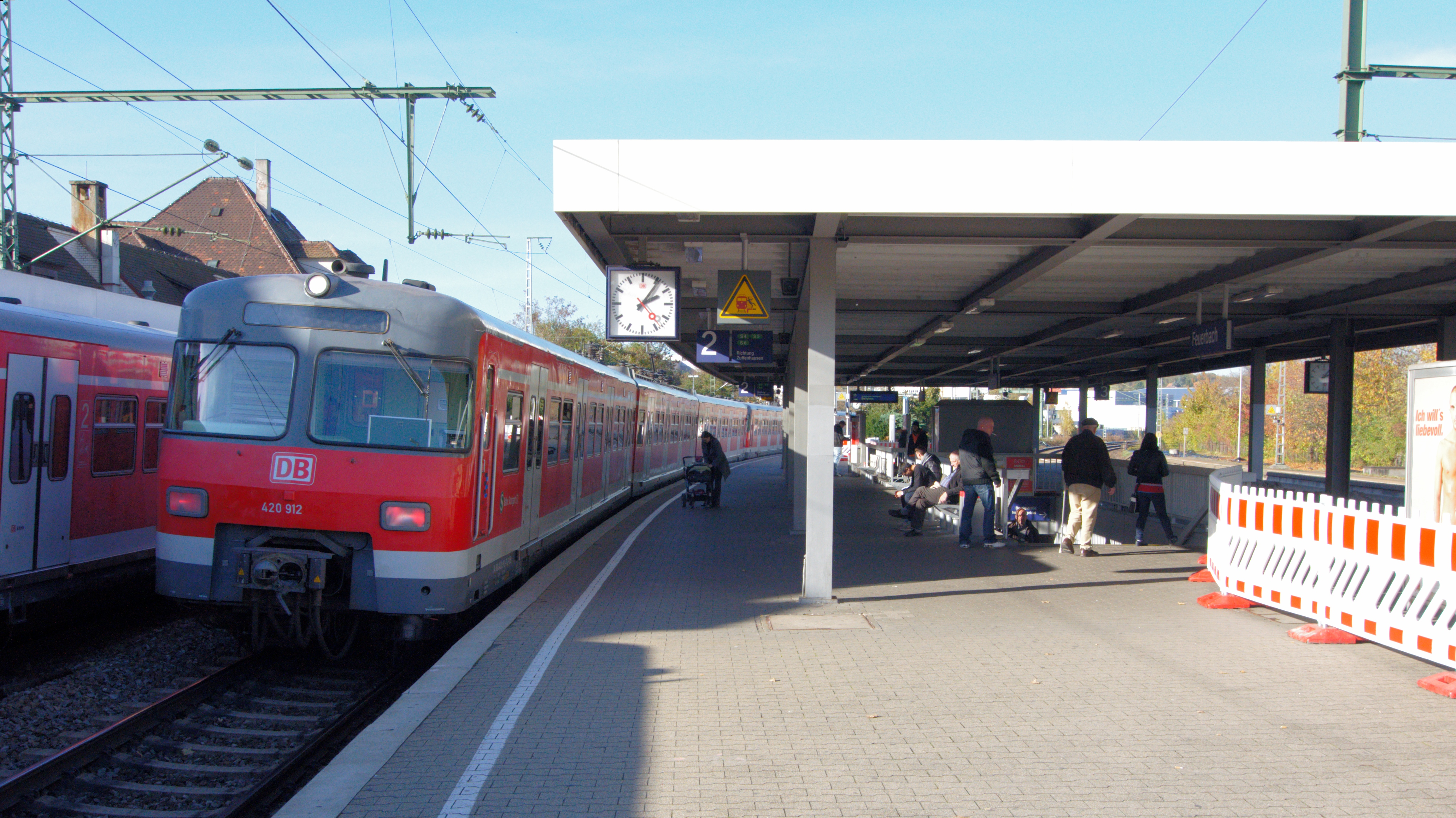 Bahnsteig des Bahnhofs Stuttgart-Feuerbach zu Beginn der Umbauten für Stuttgart 21.